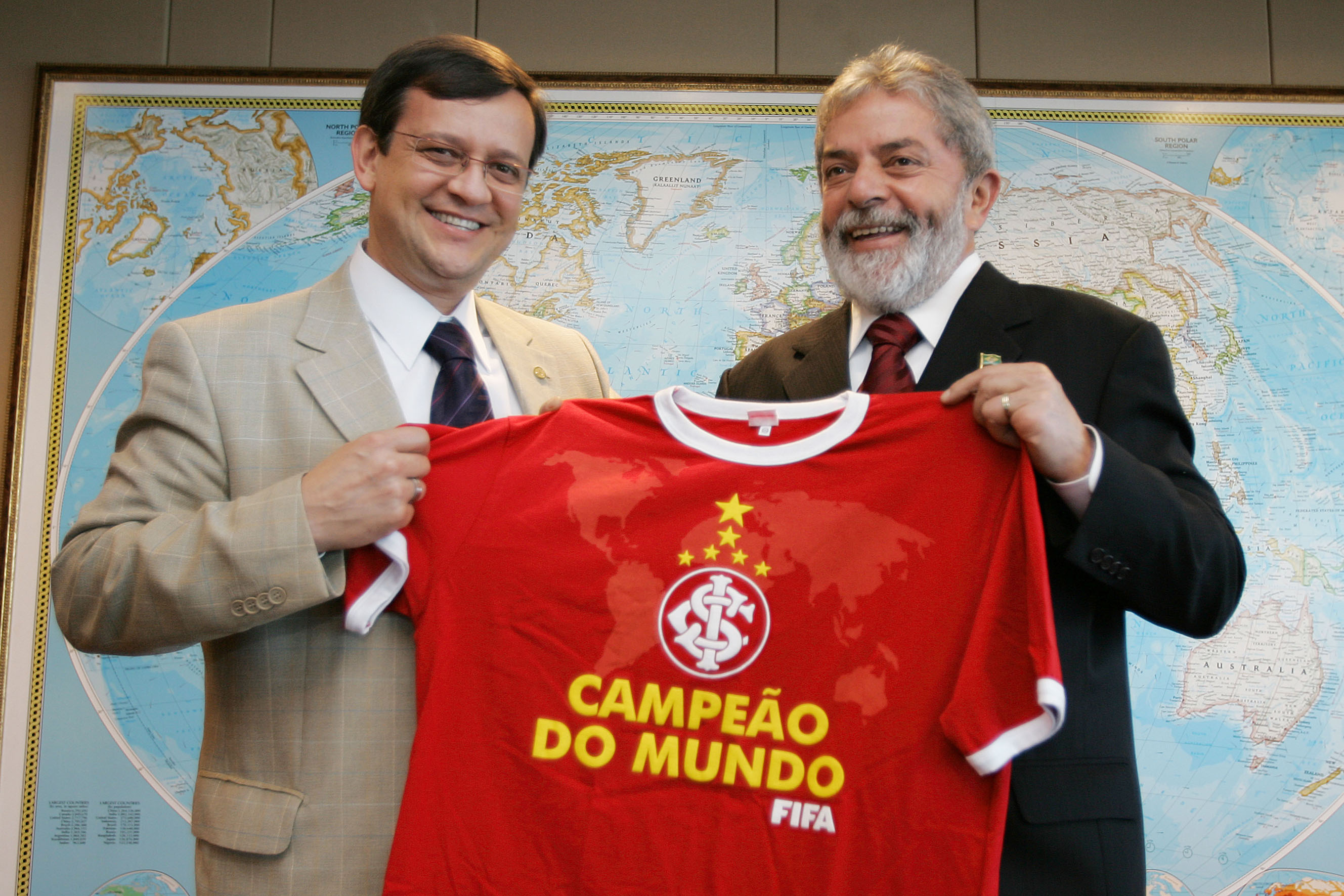 O presidente Lula é presenteado pelo deputado Beto Albuquerque com a camisa do Internacional de Porto Alegre, novo campeão mundial de clubes.